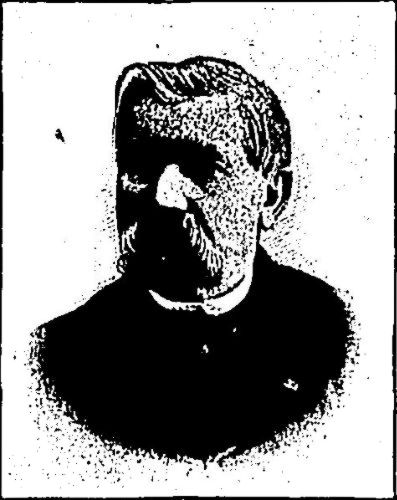 Portrait de Jean Pierre Mégnin, vétérinaire militaire, membre de l'Académie de médecine